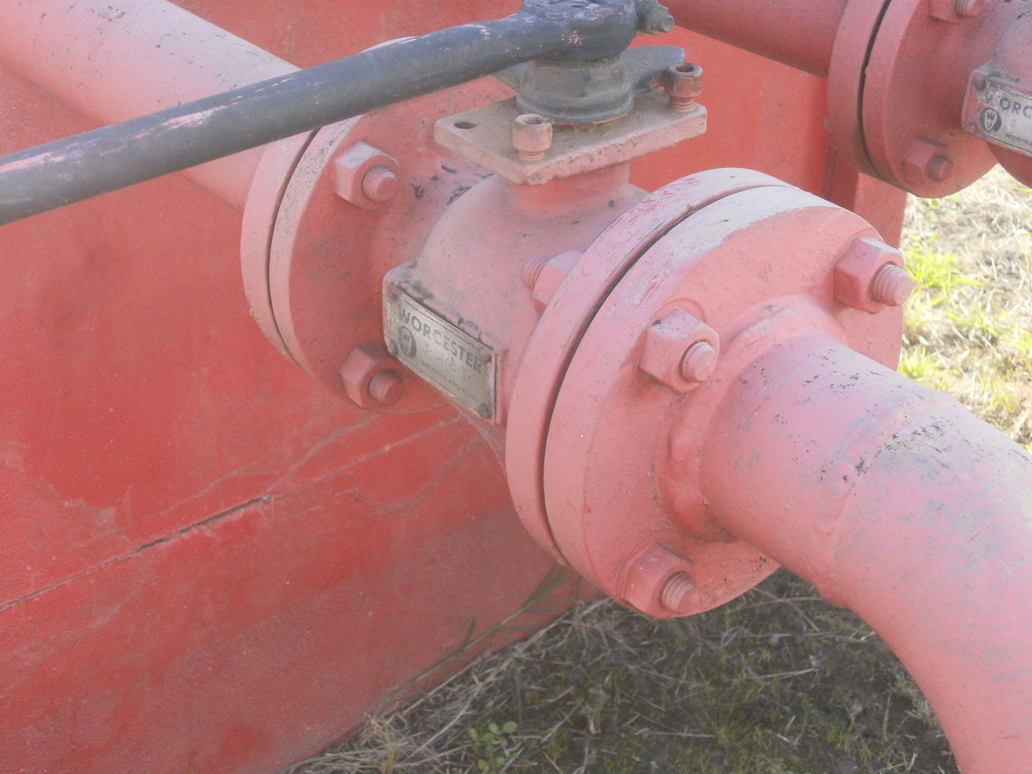 En la foto se puede ver una válvula esférica y una cañería con bridas slip on. La línea es de 3" serie 150.